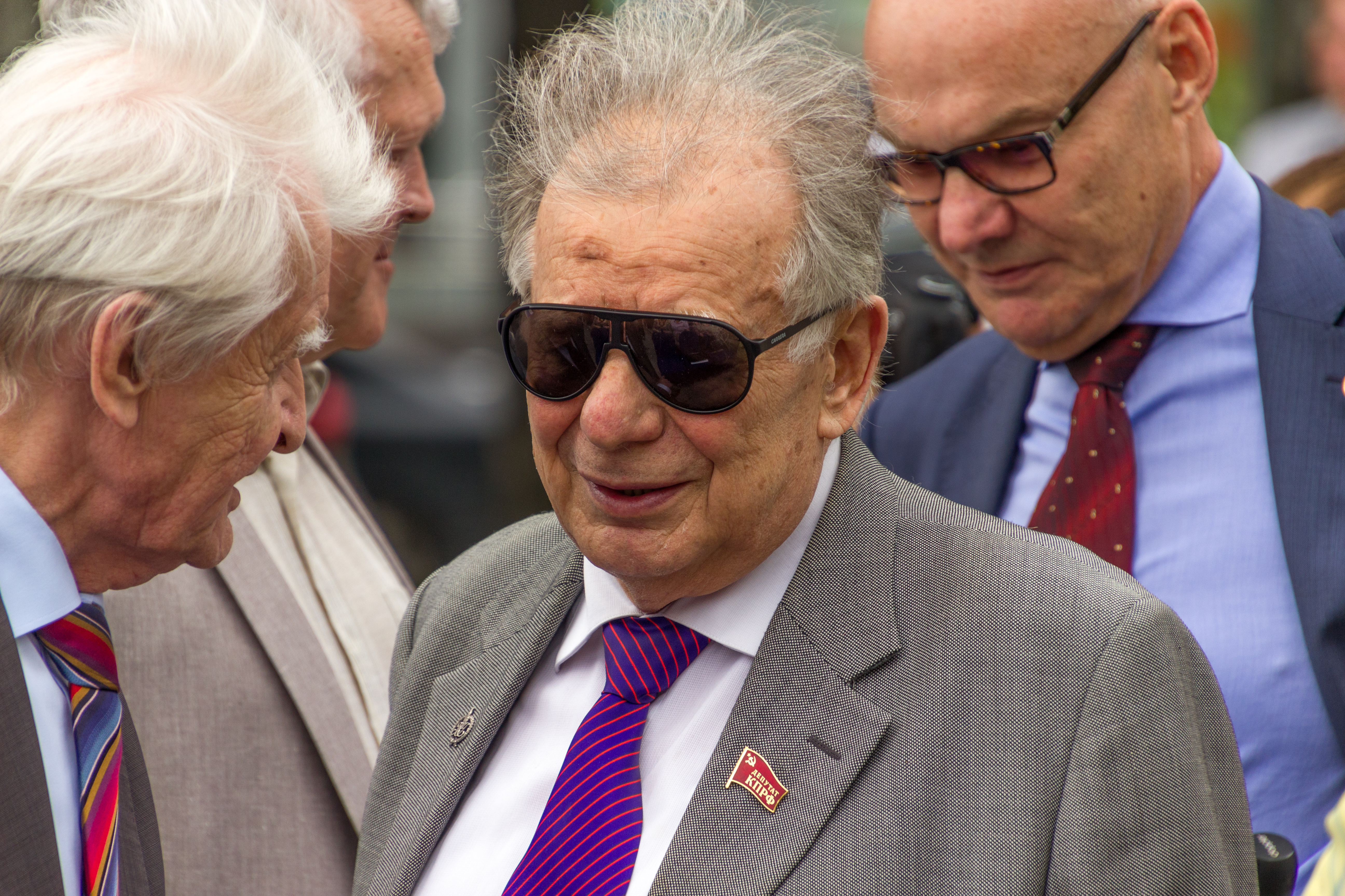 На открытии памятника А.М. Прохорову в Москве 9.07.2015